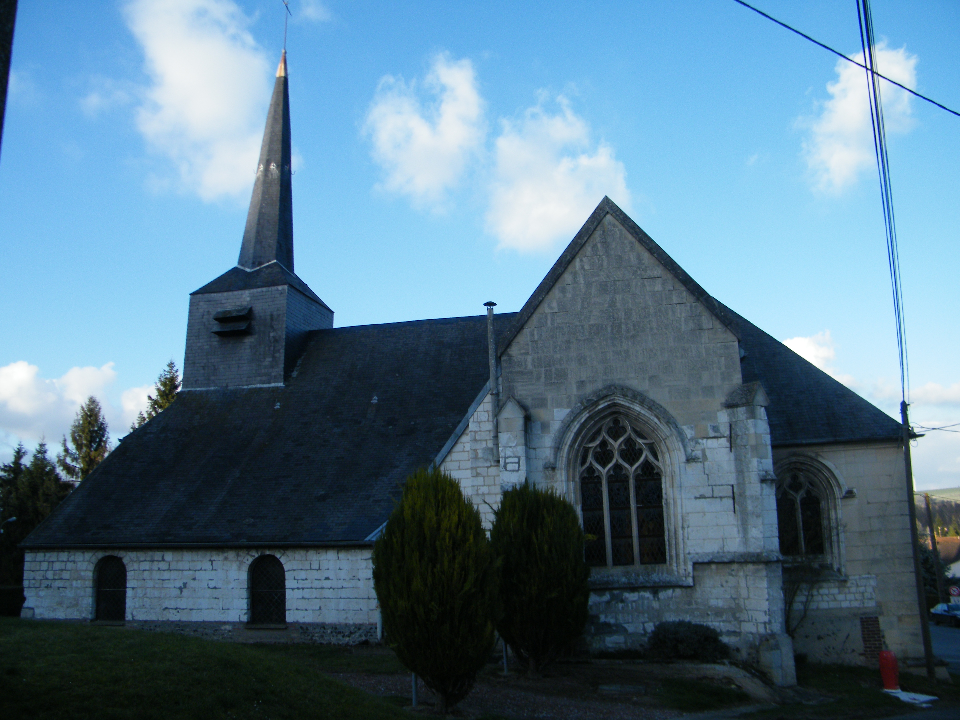 église